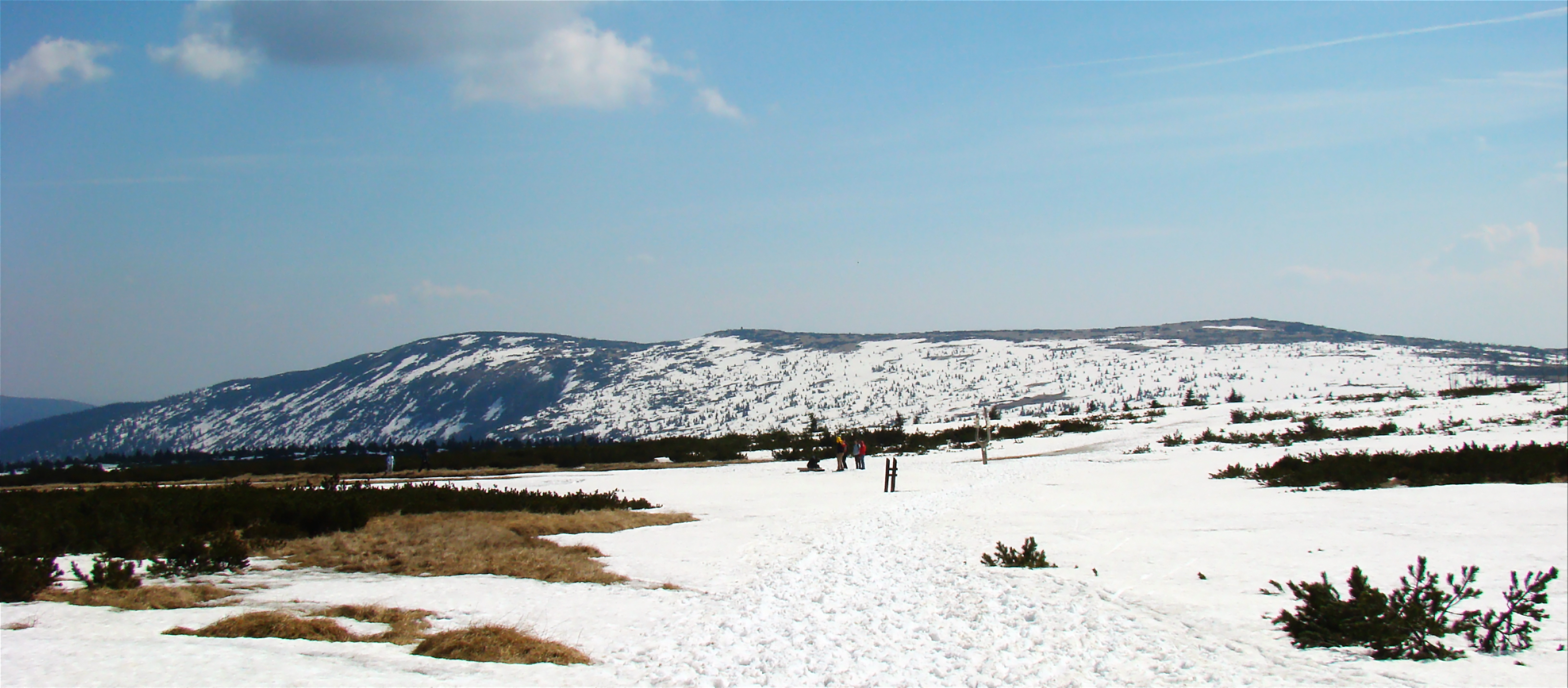 Labská louka, Krkonoše, Česko